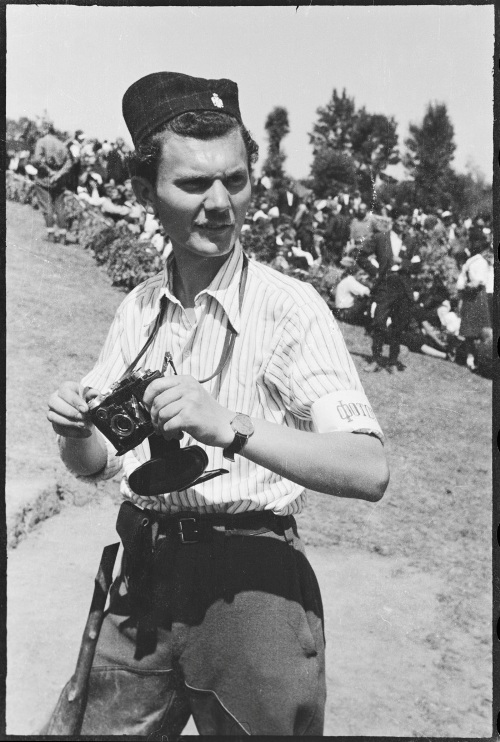 Aleksandar Simić (Čačak, 1923 — Čačak, 14. oktobar 2007) bio je jedan je od prvih i najpoznatijih čačanskih fotografa, poznat i kao jedan od fotografa Jugoslovenske vojske u otadžbini. Za vreme Drugog svetskog rata nalazio se u Vrhovnom štabu kod Dragoljuba Draže Mihailovića gde je napravio veliki broj fotografija.